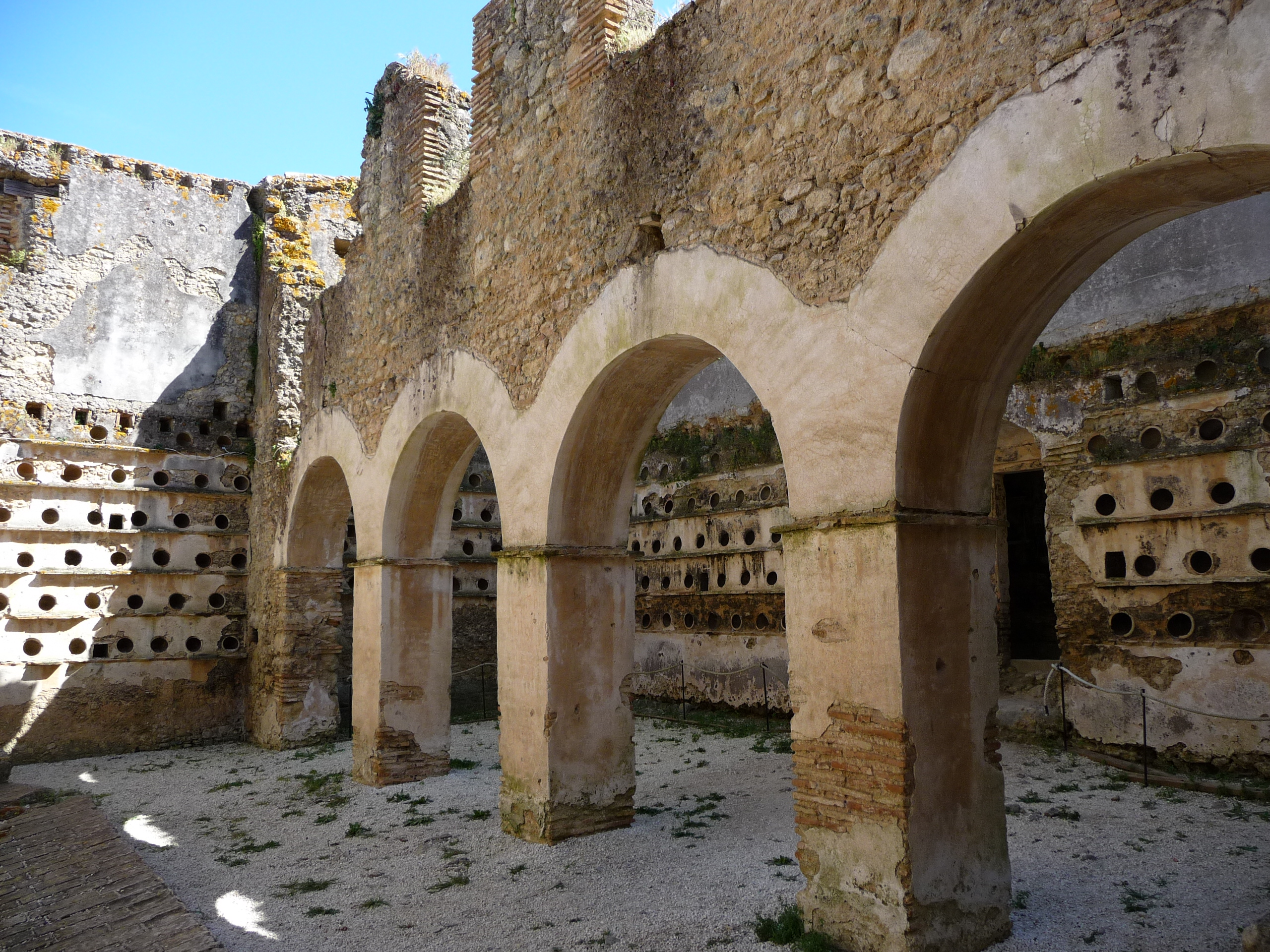 Palomar-BrennaBarbate-p1020175.jpg